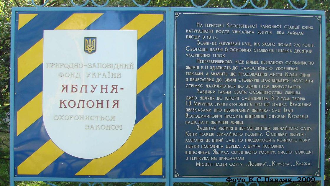 Охоронно-інформаційний знак яблуні-колонії